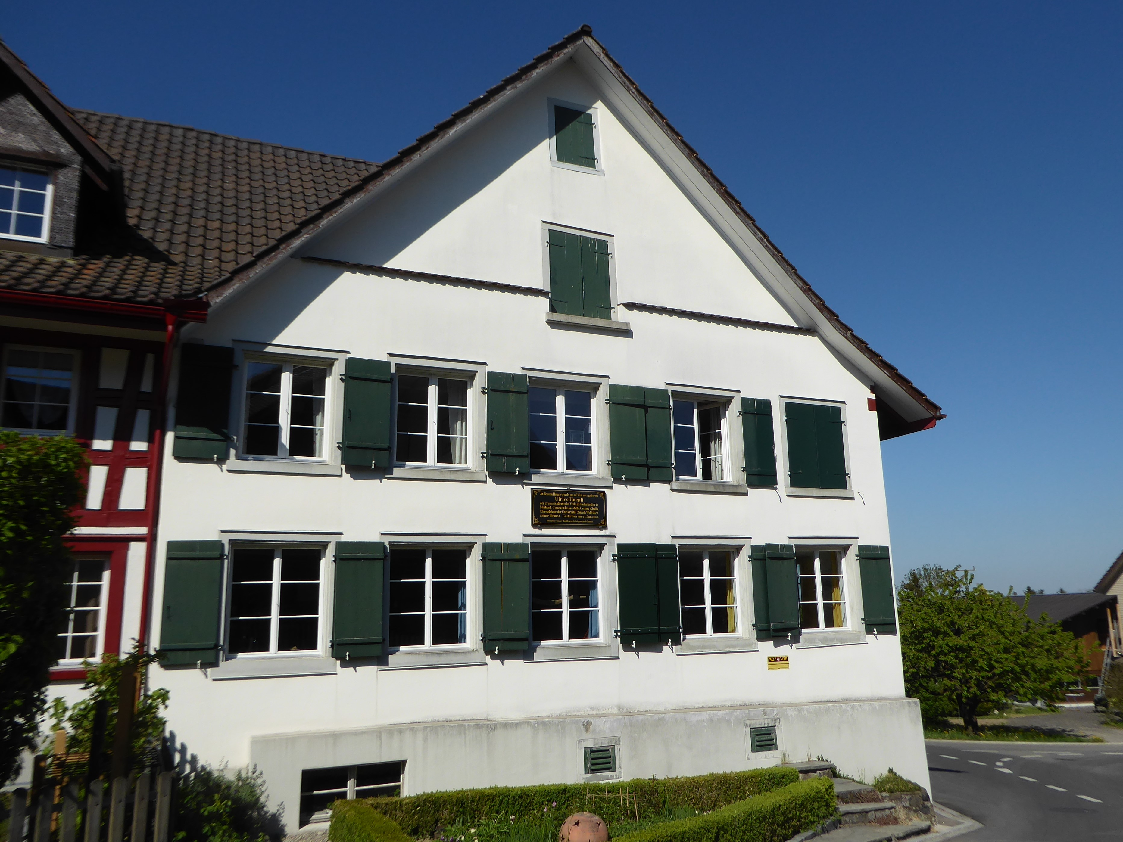 Wohnhaus Hoepli, Ulrico-Höpli-Strasse 3 in Untertuttwil